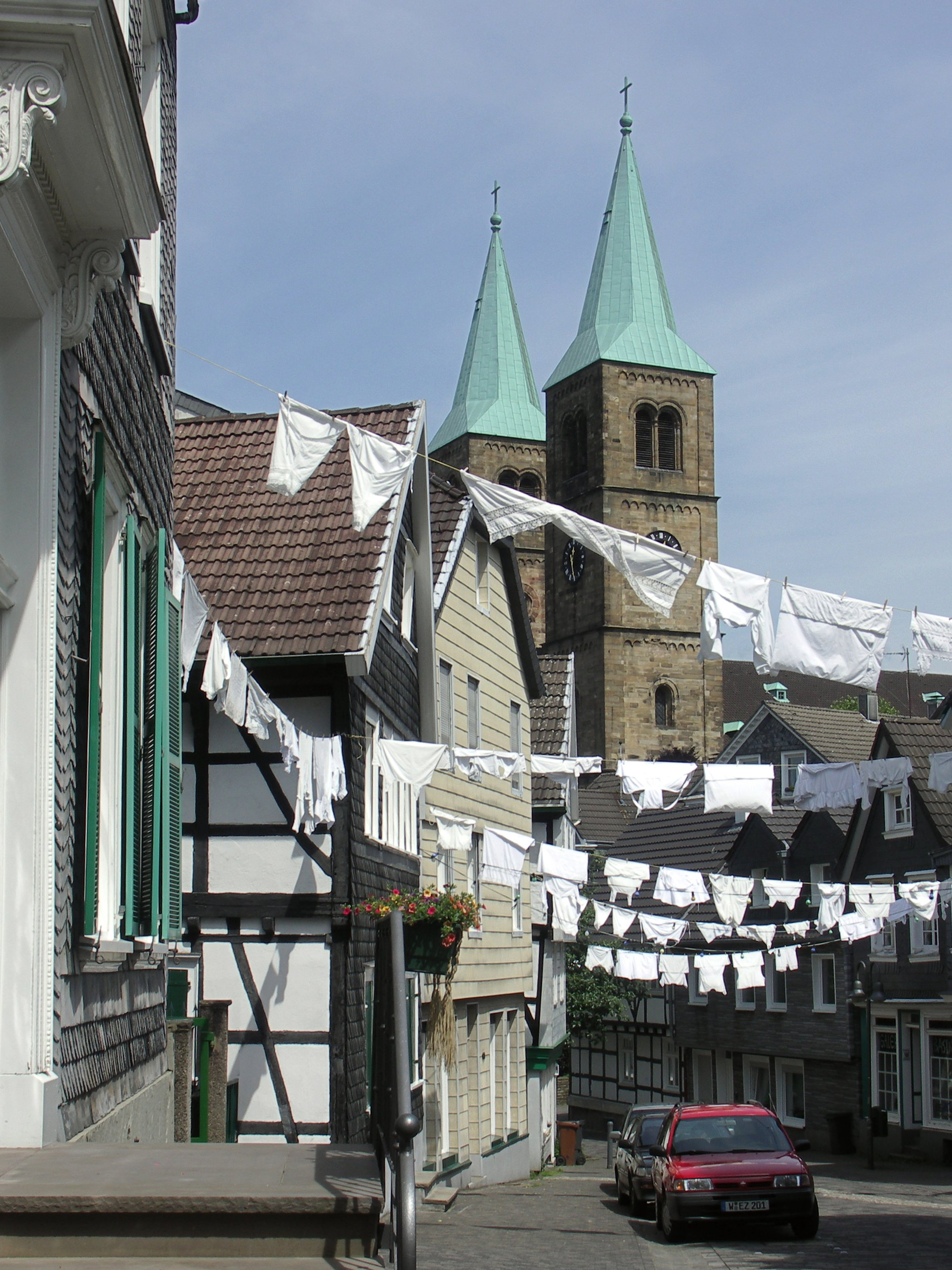 Kölner Straße in Schwelm, zu Zeit des Altstadtfestes mit weißer Wäsche dekoriert (im Hintergrund die evangelische Christuskirche)